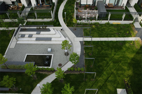 Marienlyst Park er tegnet av Gullik Gulliksen AS Landskapsarkitekter MNLA.